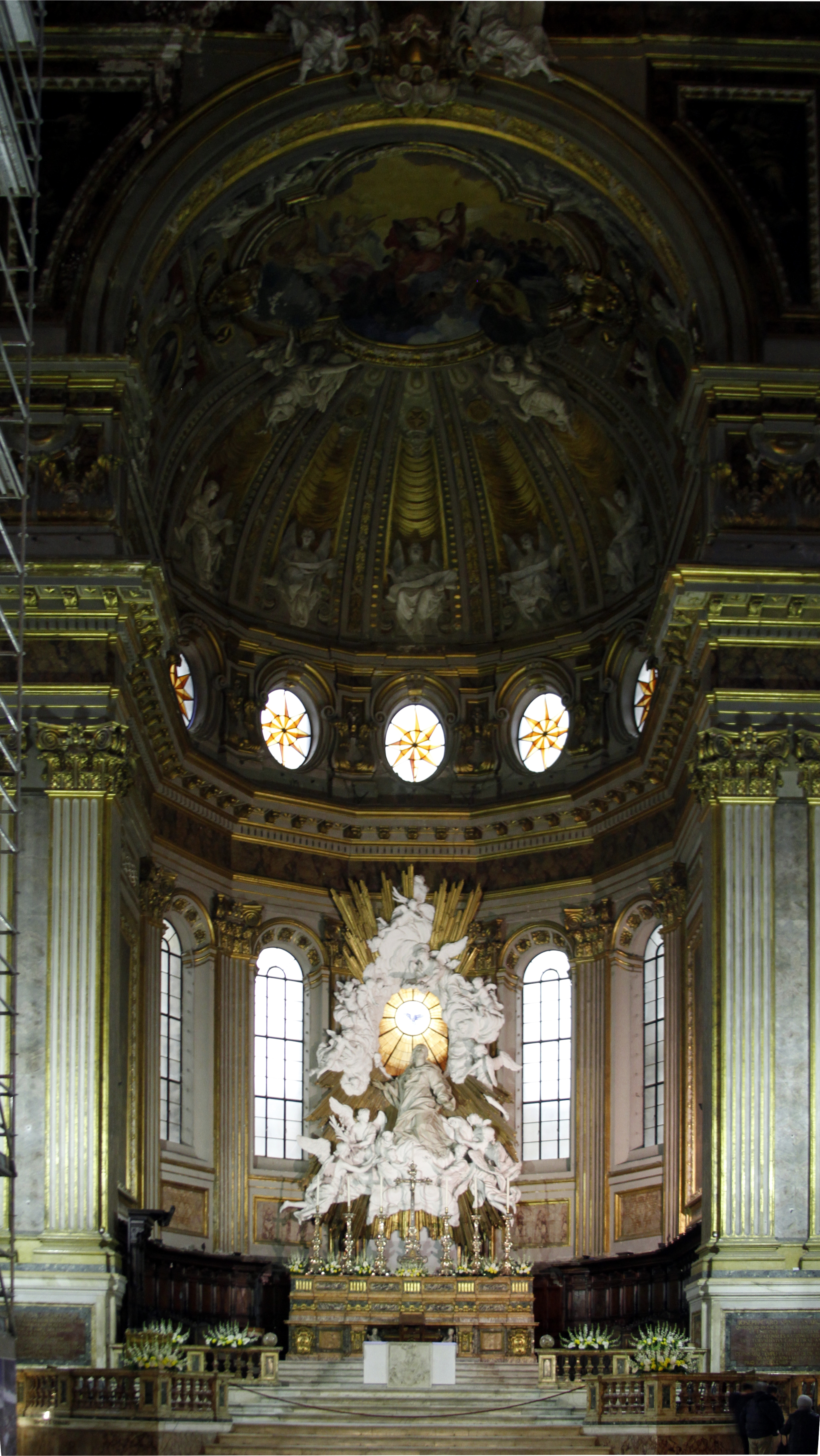 Altar-mor da Catedral de Nápoles